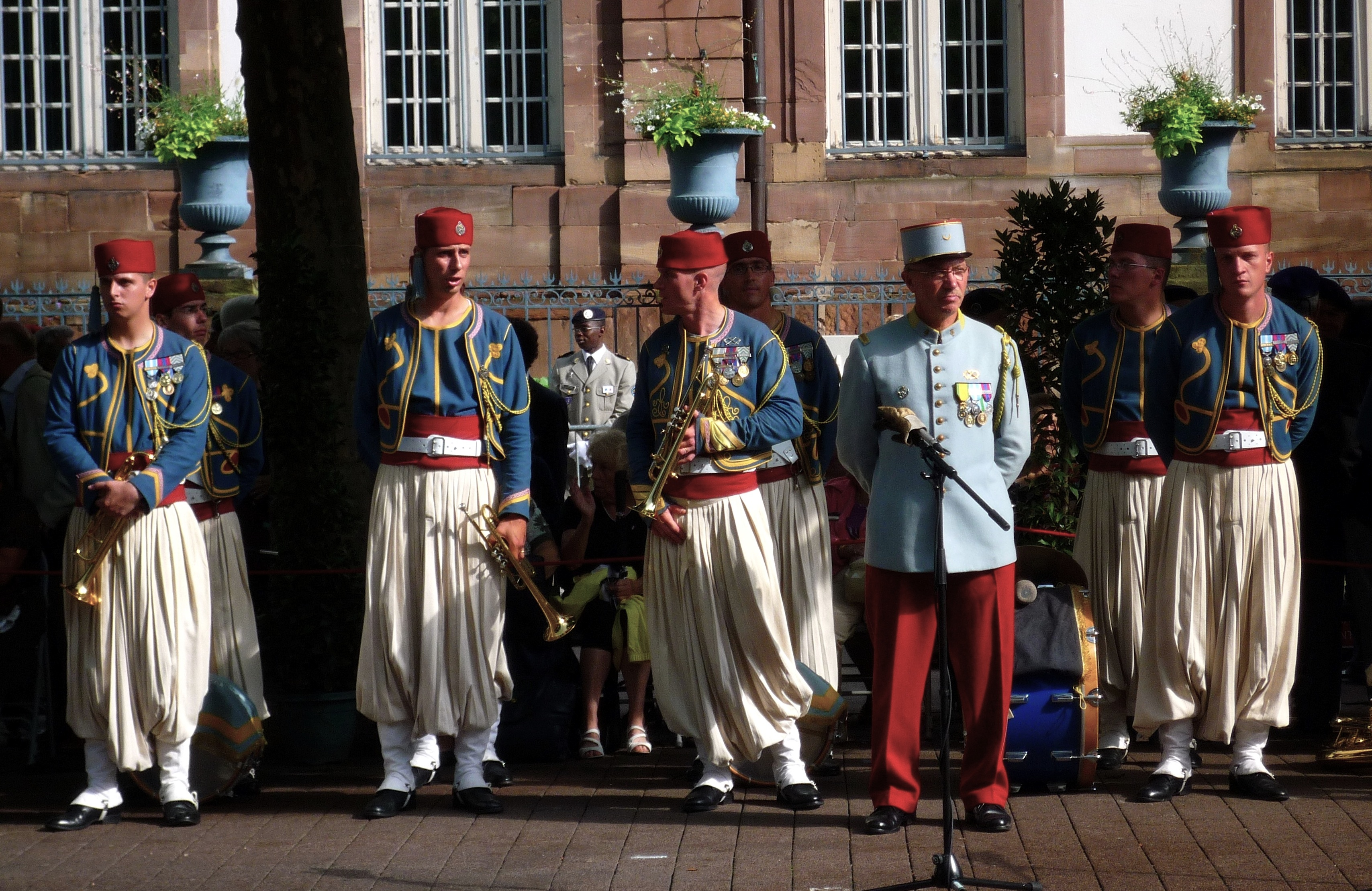 La «Nouba» du 1er Régiment de Tirailleurs d'Épinal en tenue de Tradition, chéchia, boléro et sarouel, héritage de la tenue des Tirailleurs Algériens lors des cérémonies du 14 juillet 2009, place Broglie à Strasbourg